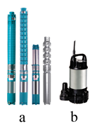 a) gręžinių (daugiapakopiai) b) nuotekų (vienapakopiai)